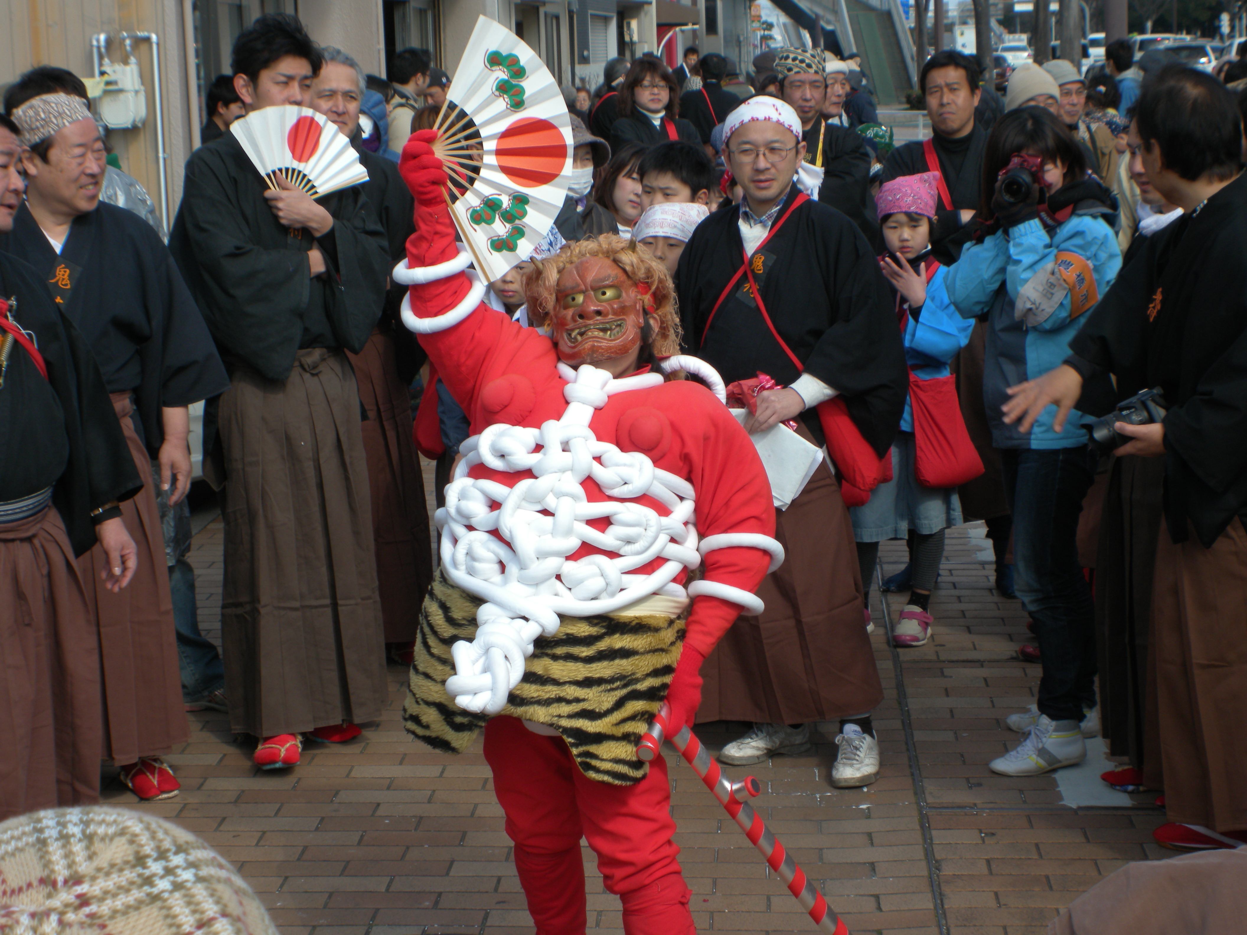 飽海神戸神明社の鬼祭り